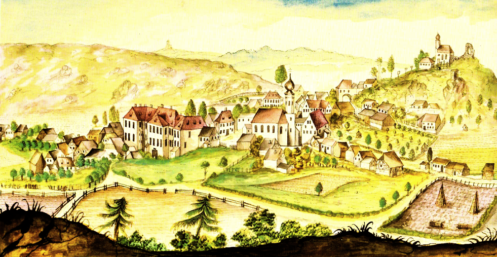 Markt Lutzmannstein um 1800 gegen Westen